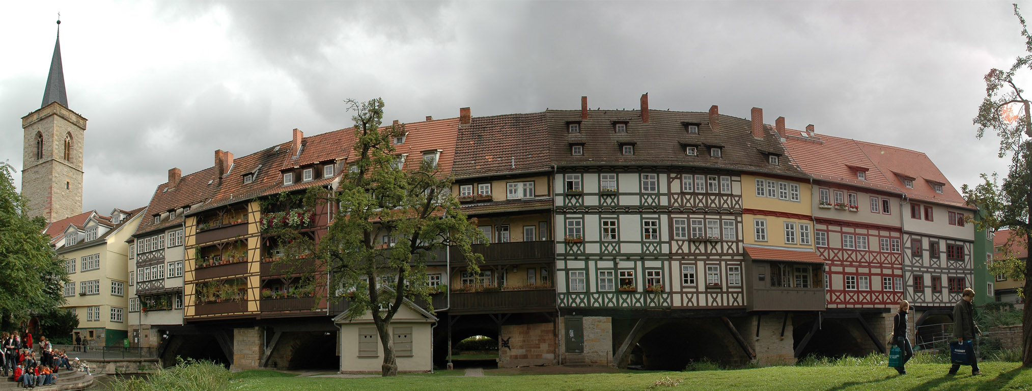 Krämerbrücke in Erfurt aus Richtung Norden